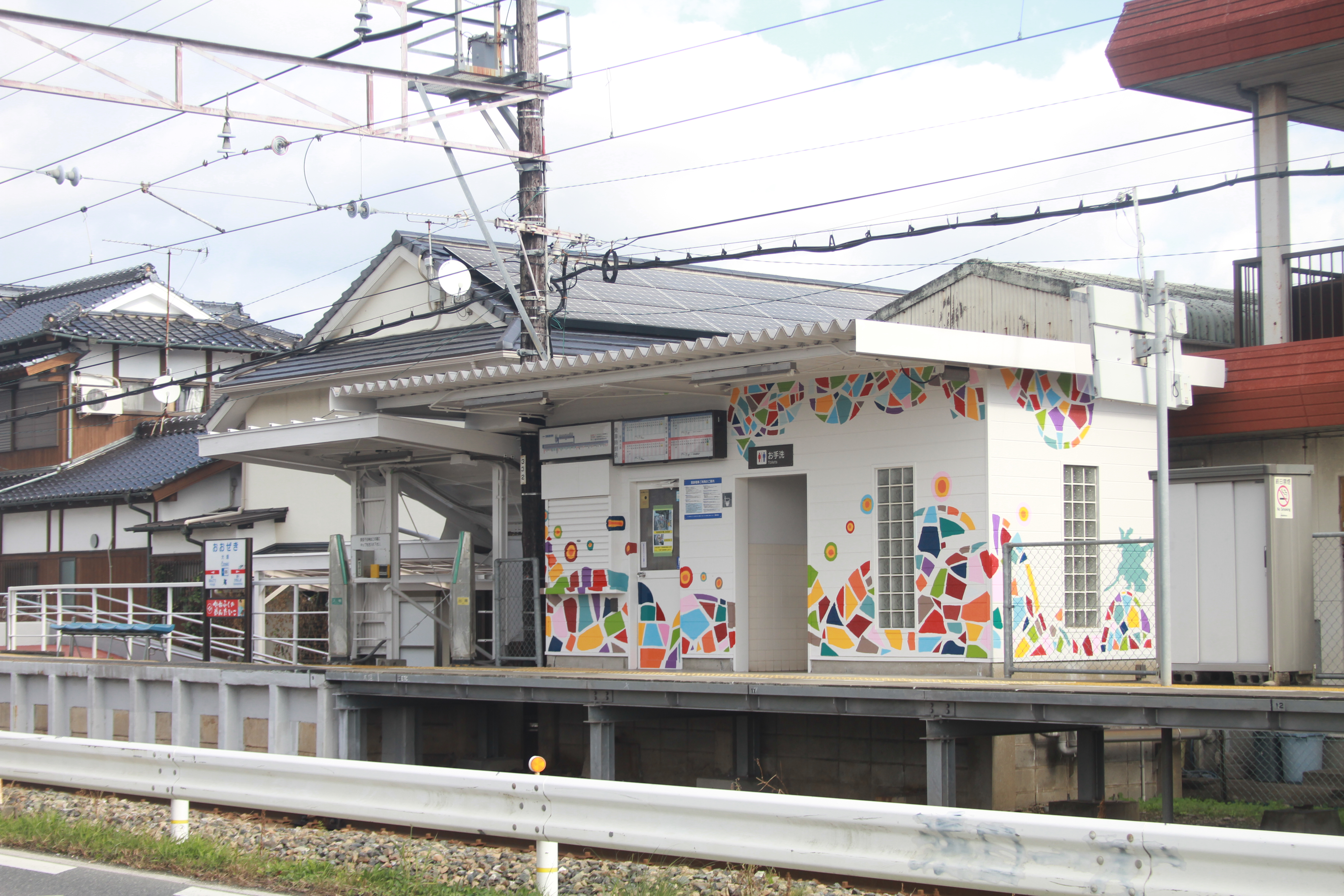 西鉄甘木線 ホーム側から見る大堰駅駅舎